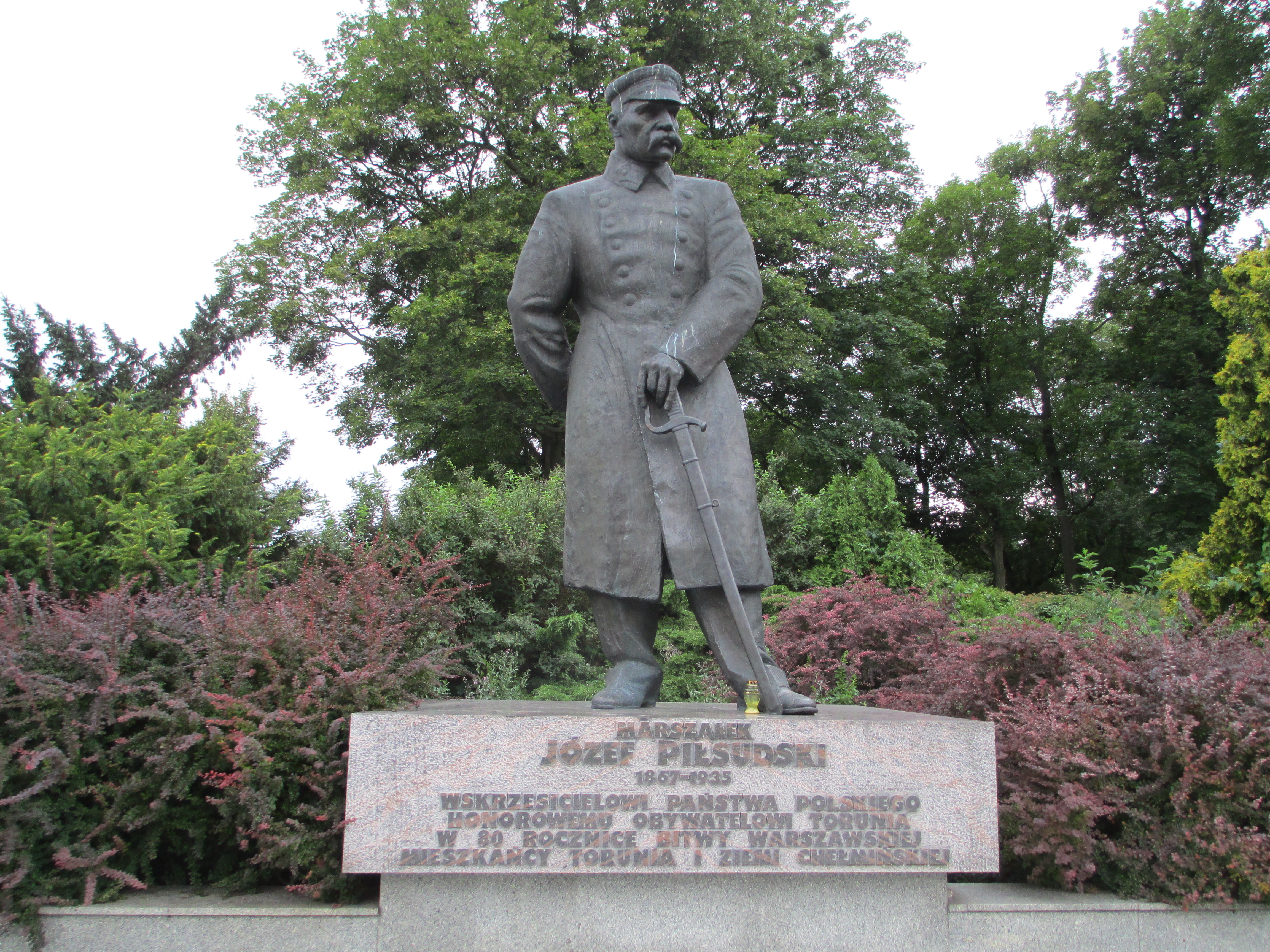 פסל של יוזף פילסודסקי בטורון